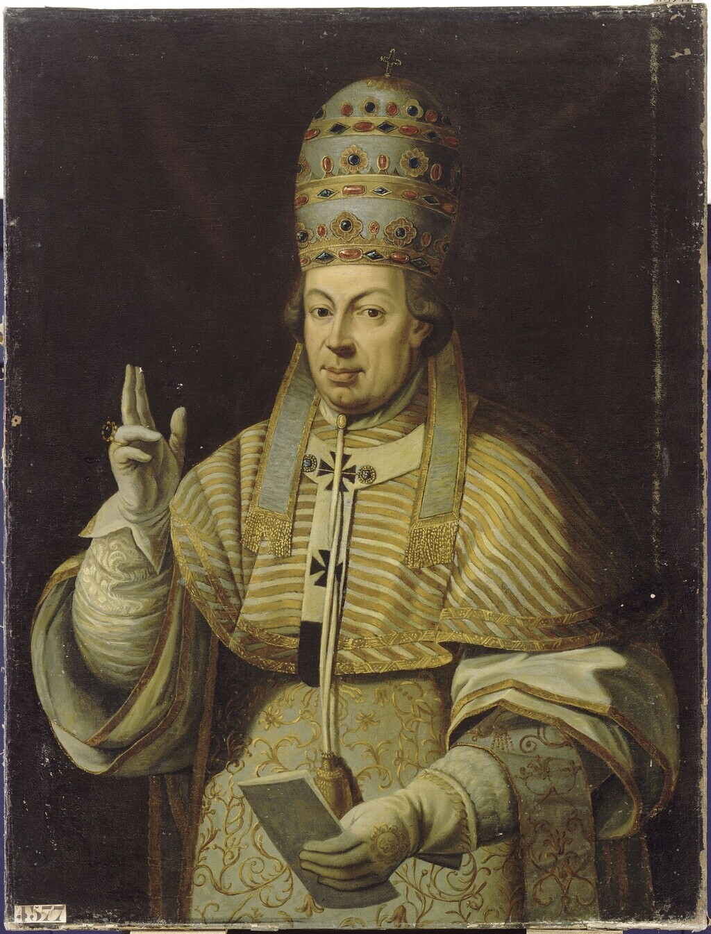 PIE VI, PAPE (1717-1799)